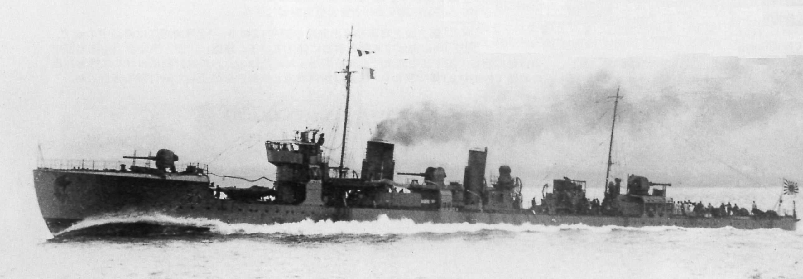 竣工前の大正13年7月、館山沖で終末航試中の第8号駆逐艦。のちの早蕨。